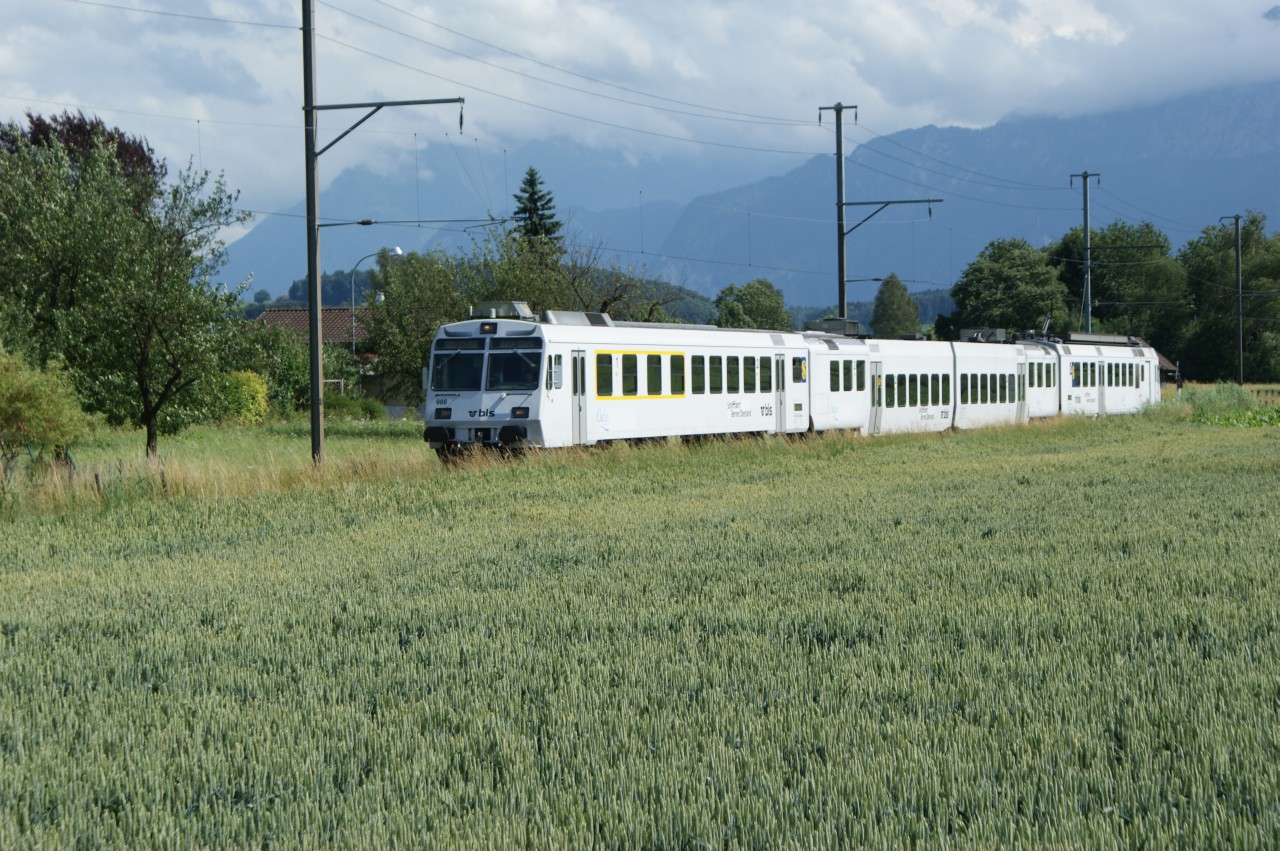 Der BLS "White Bull" RBDe 565 735 - B 601 - ABt 988 im Sommer als "Oasee" unterwegs im Gürbetal